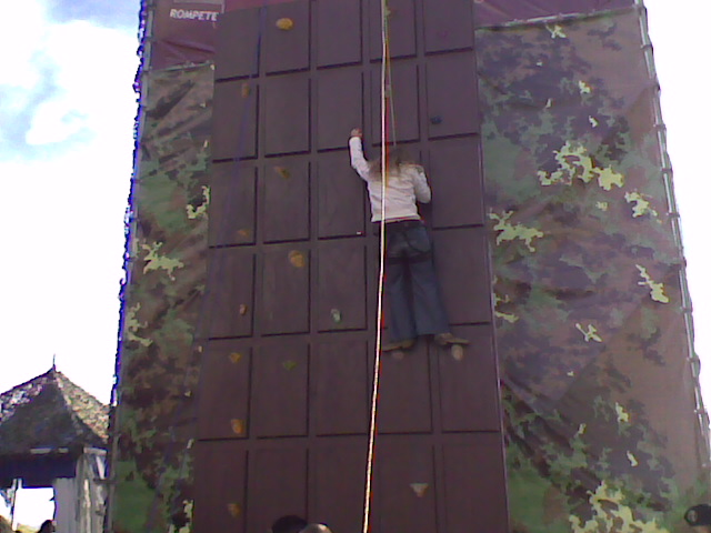 Eurochocolate 2009 - Parete da arrampicata a forma di cioccolata